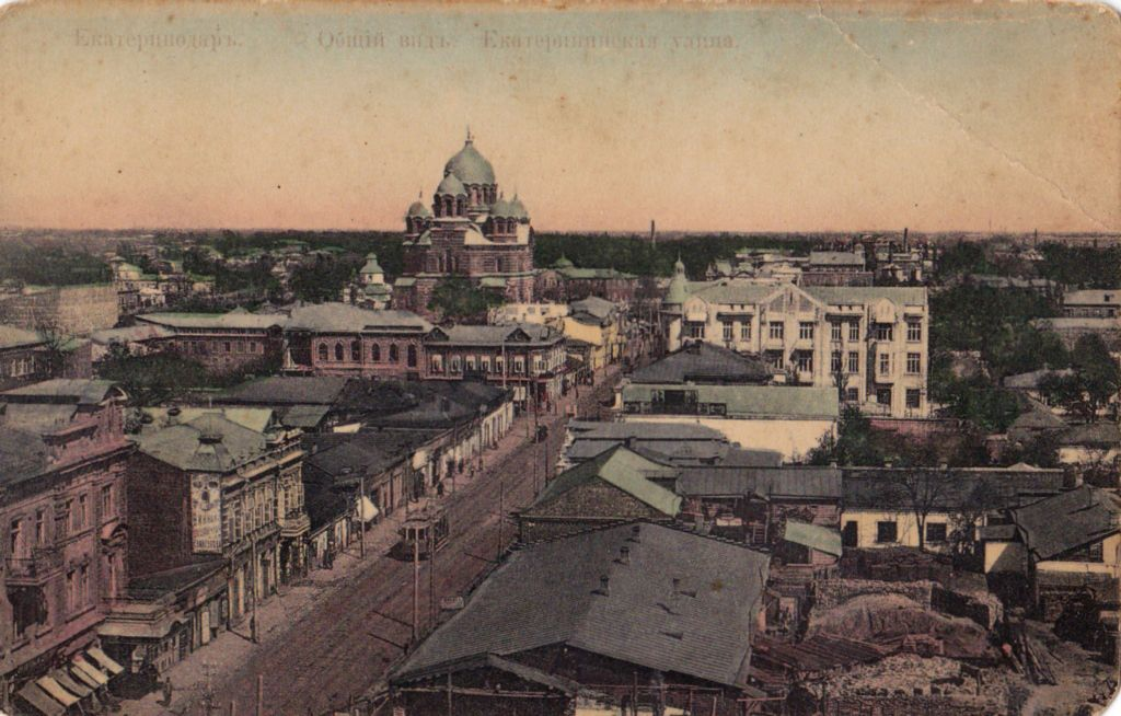 г. Краснодар Екатерининская улица 1914